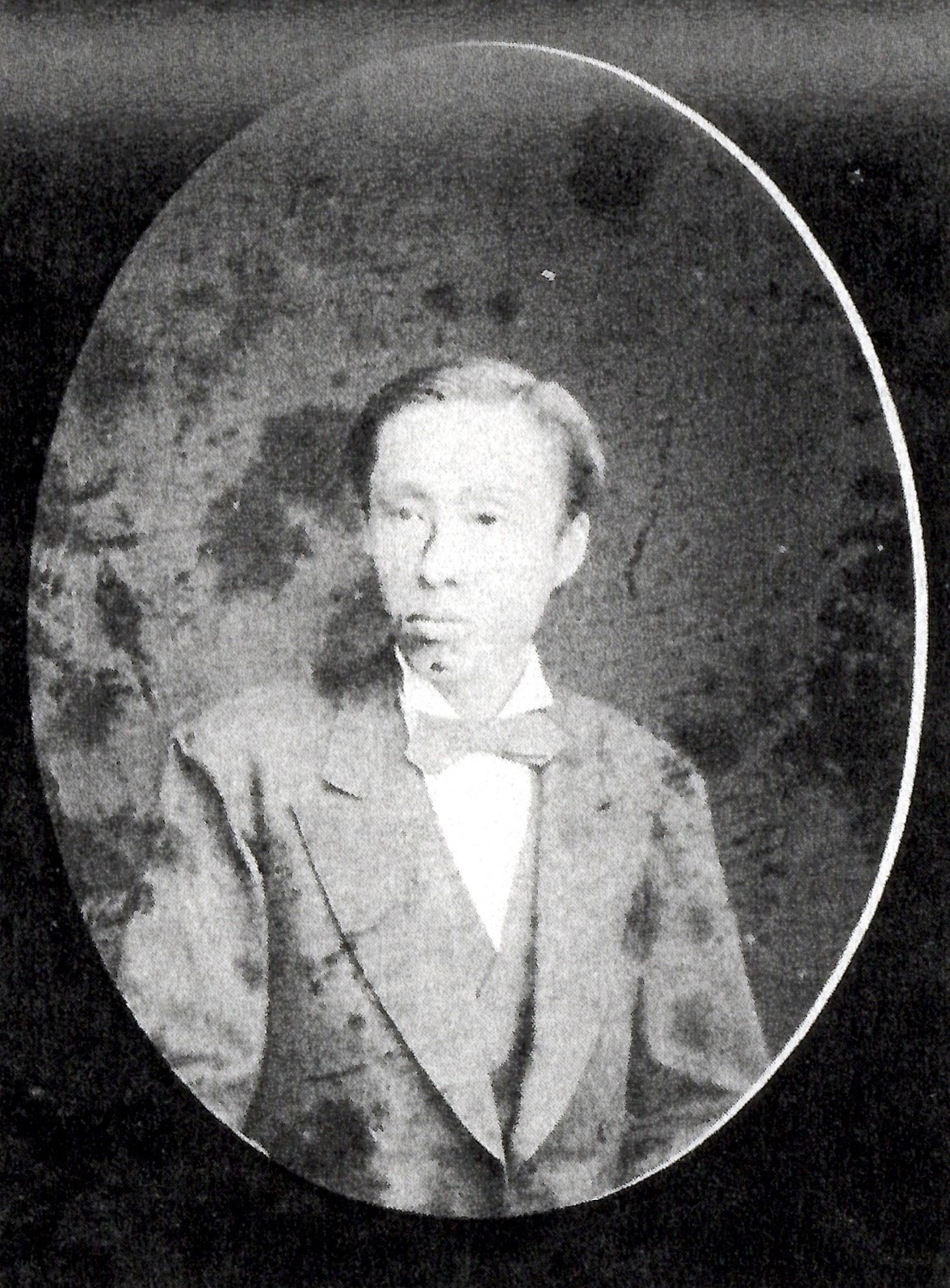 綾小路有良の肖像写真。